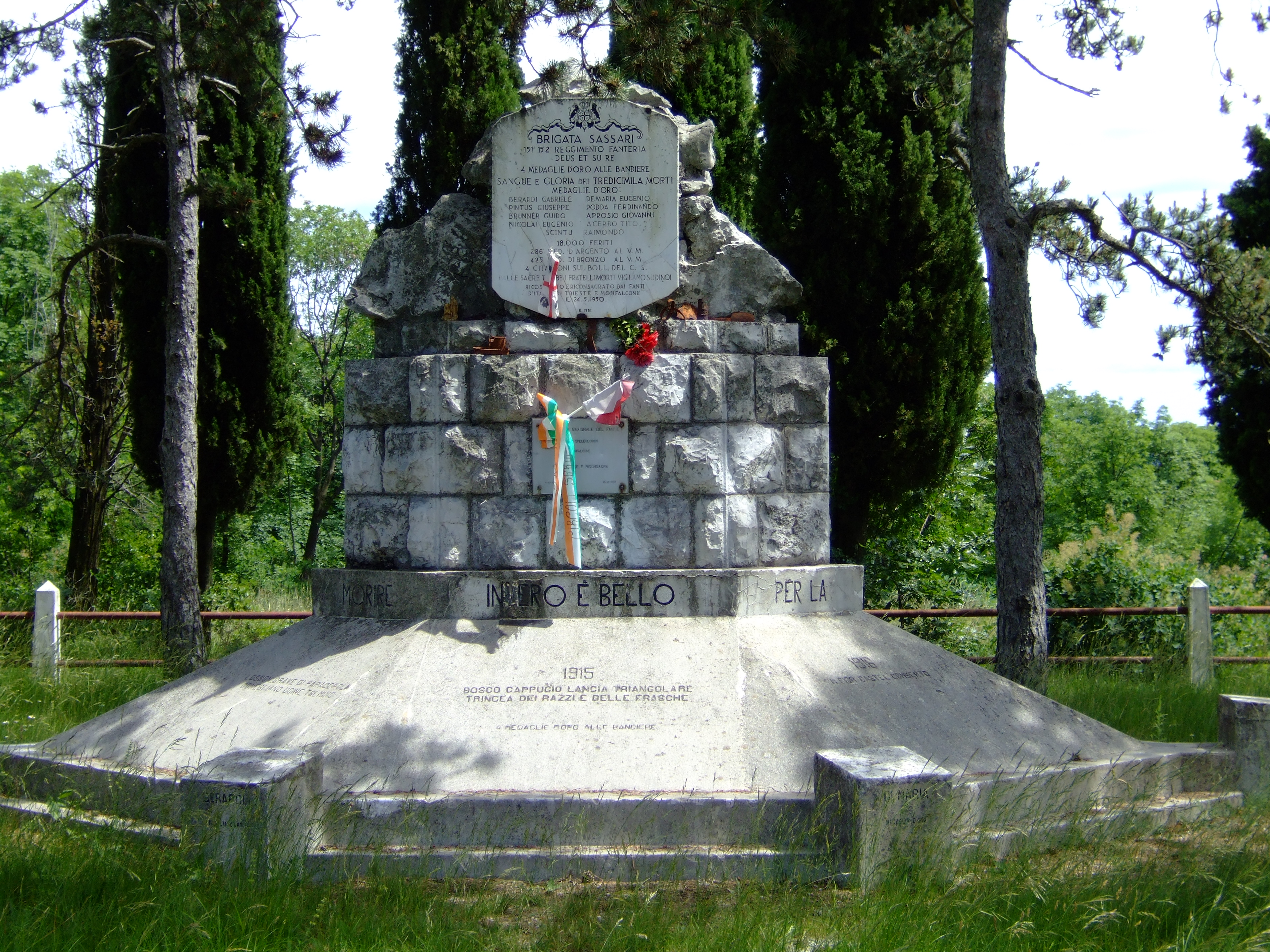 San Martino del Carso (Sagrado - Gorizia) - CippoSassari